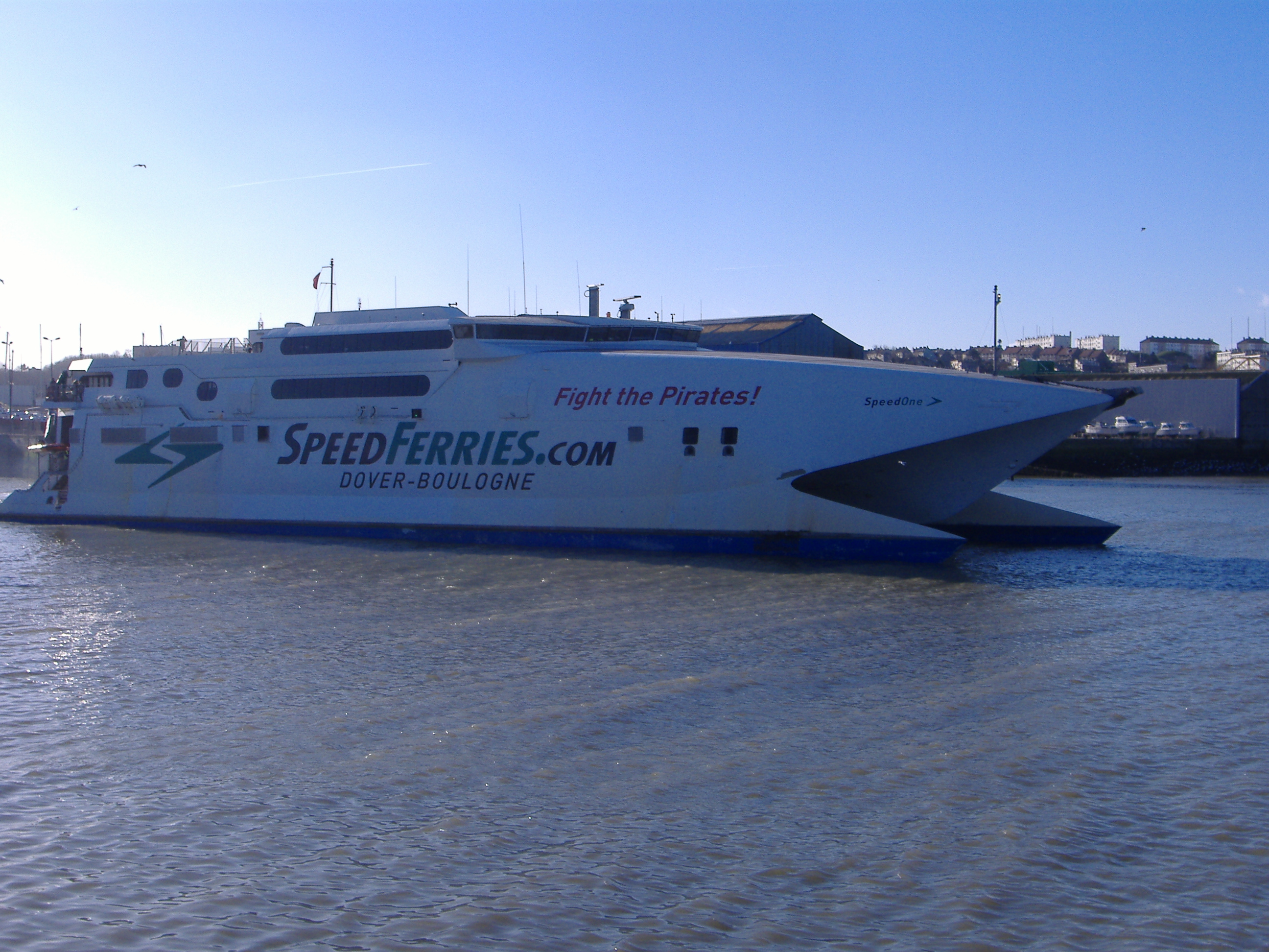 Incat Katamaranfähre SpeedOne des Fährbetreibers SpeedFerries im Hafen von Boulogne-sur-Mer